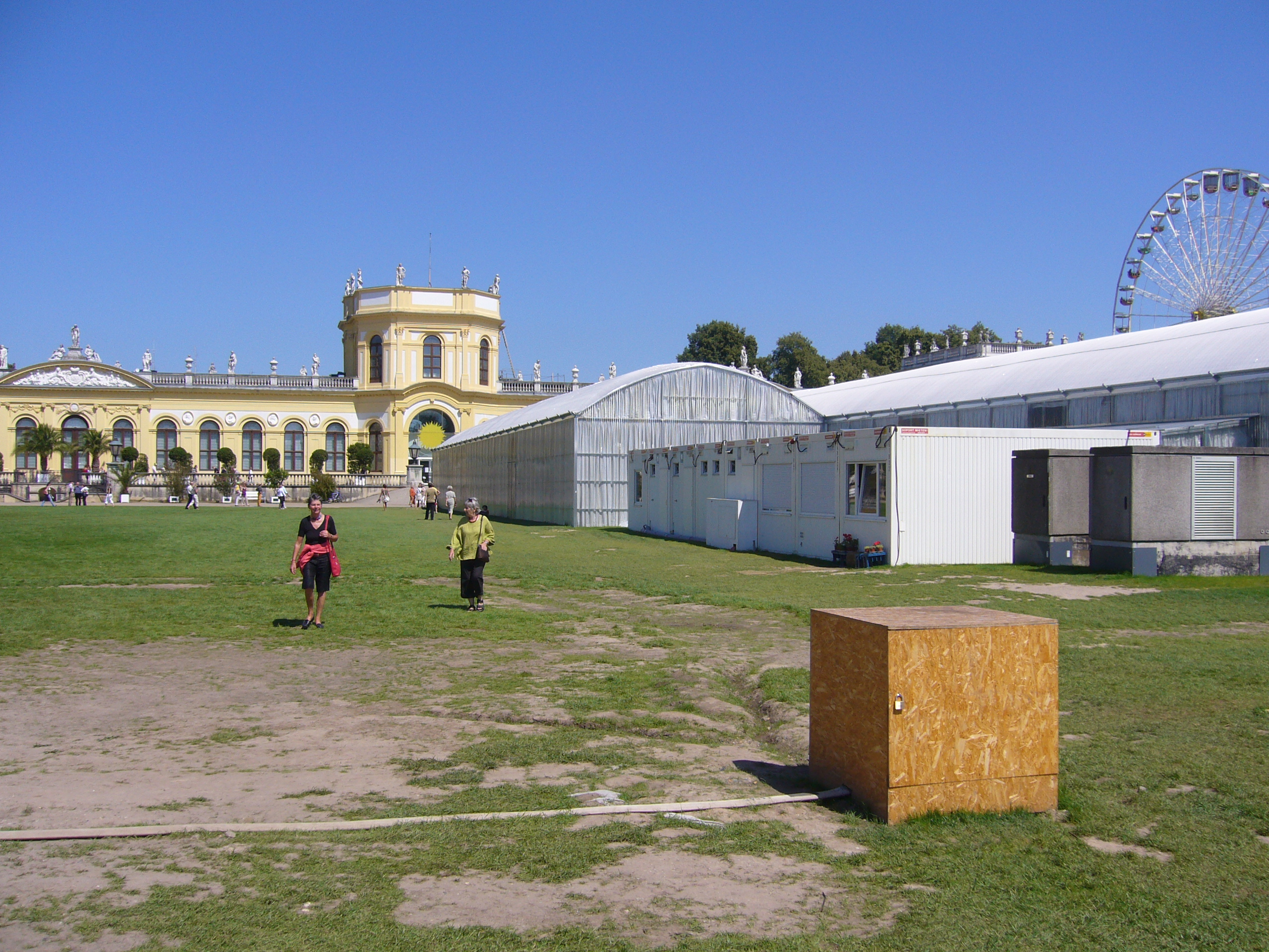 Aue-Pavillon auf der documenta 12 in Kassel (Außenansicht)